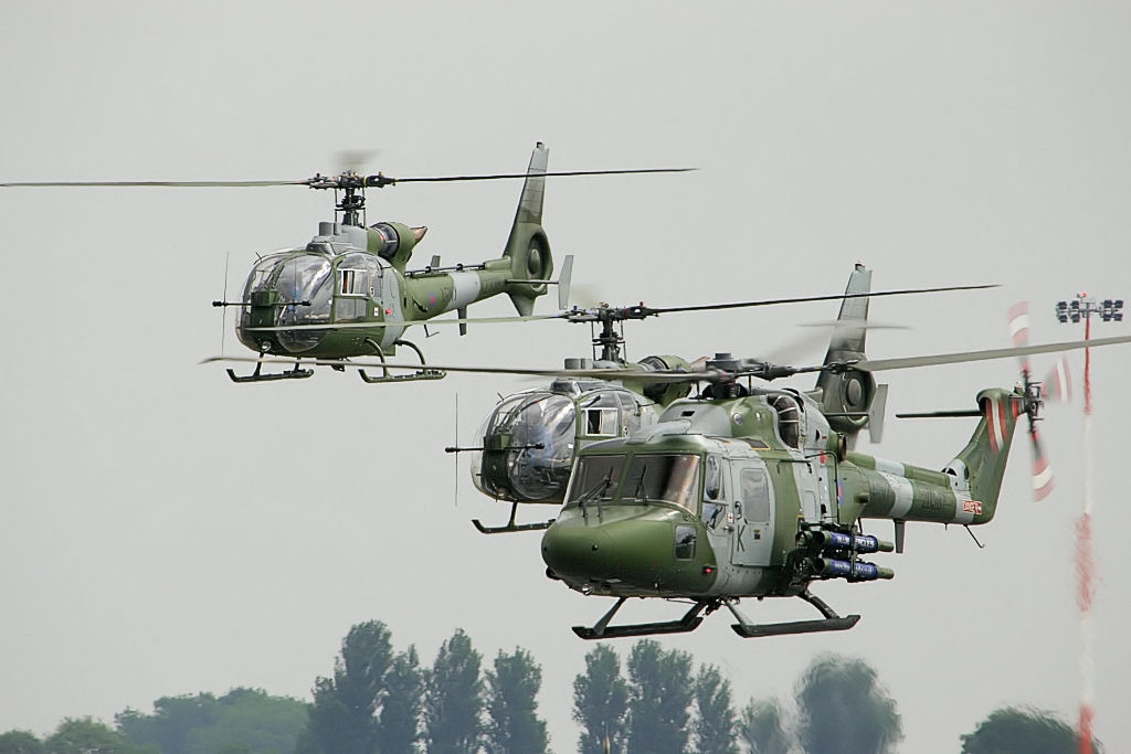 Blue Eagles - RIAT 2005